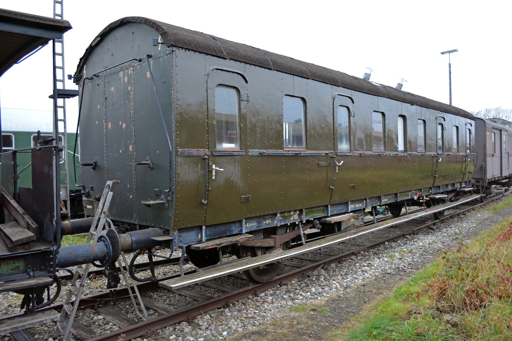 Abteilwagen 4. Klasse der DRG (Baujahr 1924, Hersteller: Waggonfabrik Fuchs) im Bayerischen Eisenbahnmuseum in Nördlingen